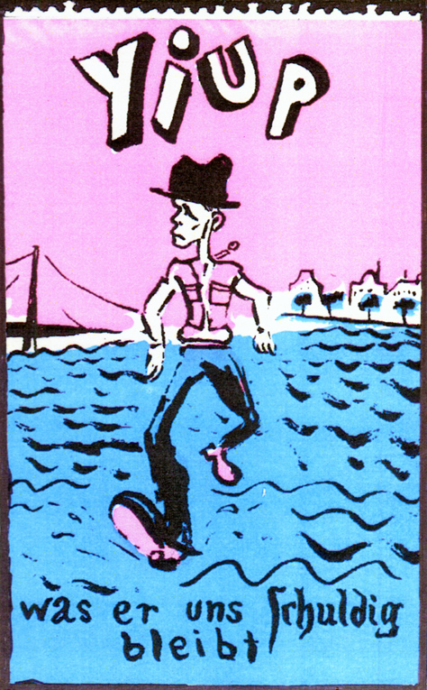 Siebdruck: Beuys überquert zu Fuß den Rhein